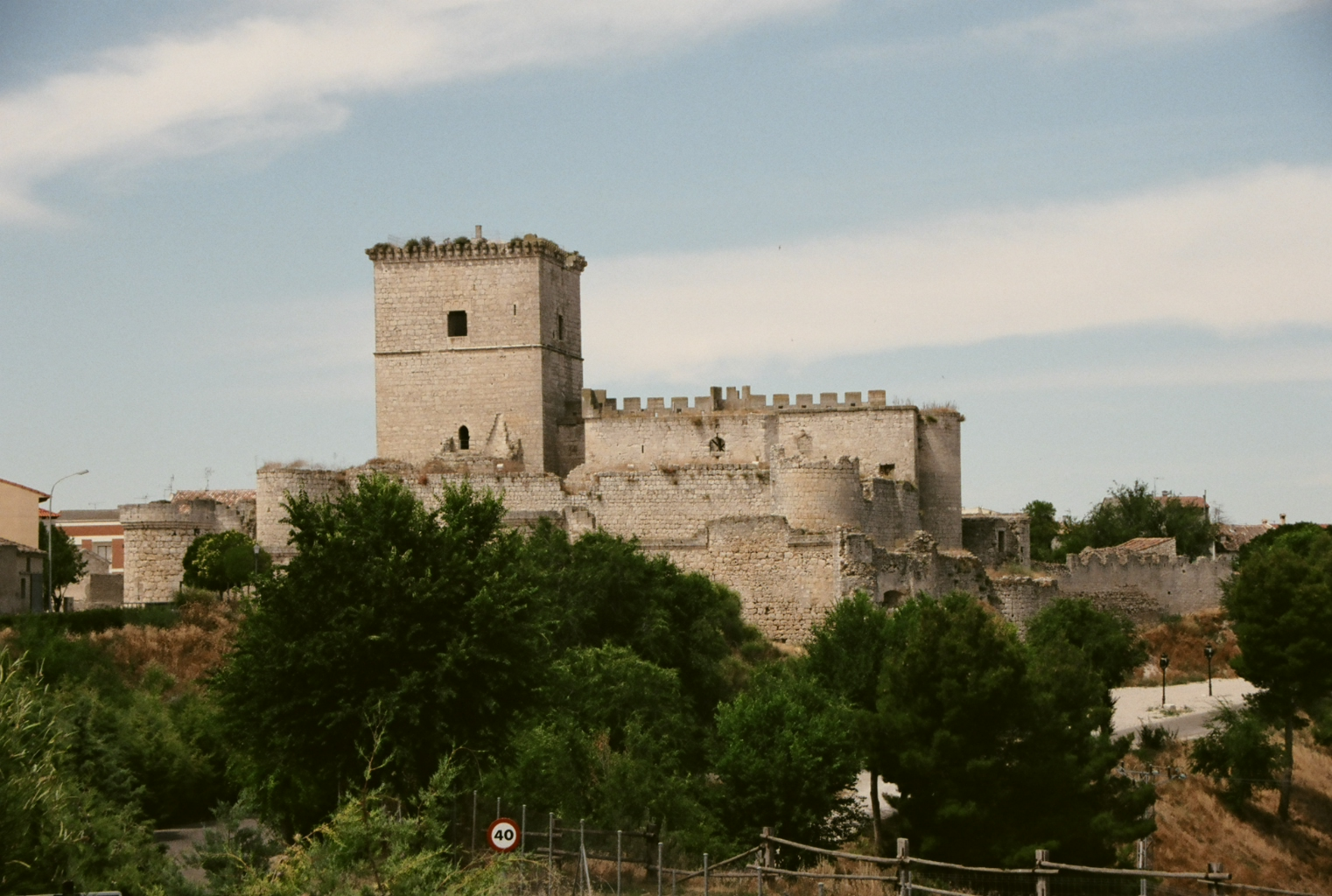 Casillo de Portillo